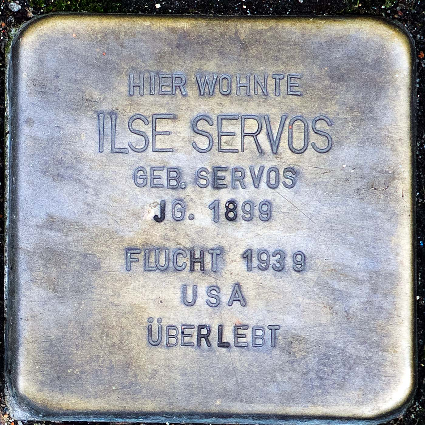 Stolperstein für Ilse Servos (Willich)